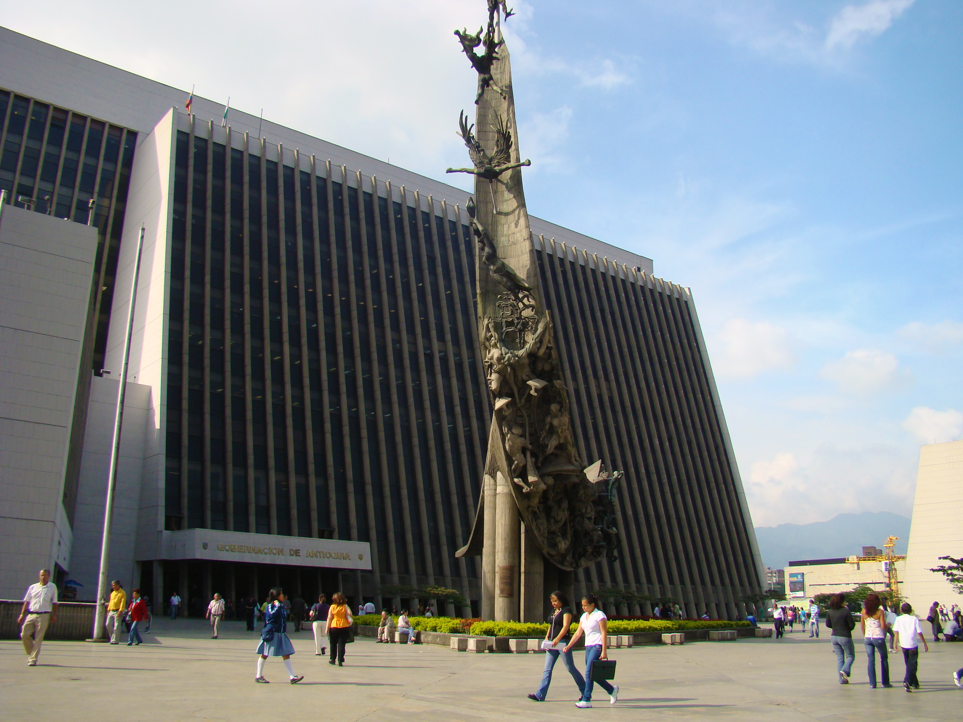 Edificio de la Gobernación de Antioquia y Monumento a la Raza en el centro.